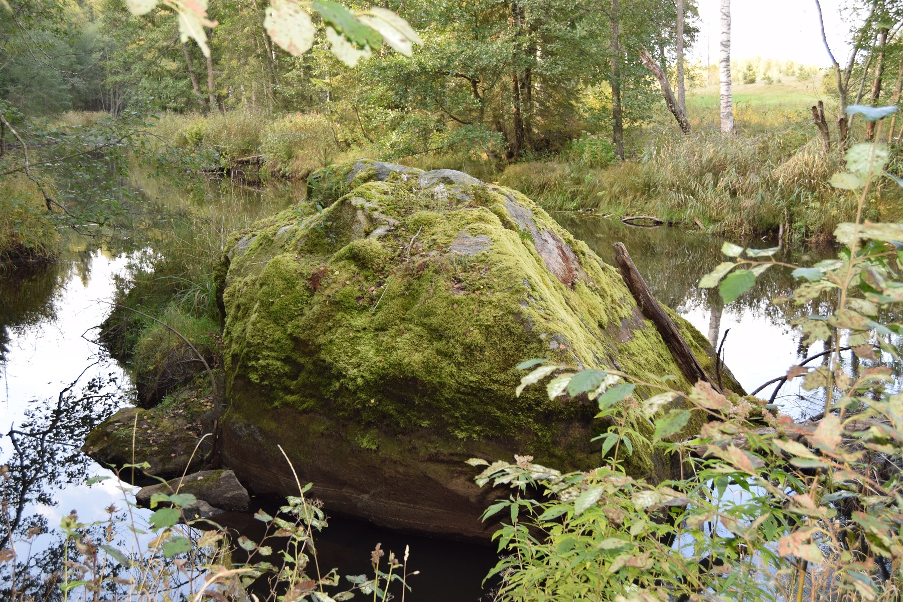 Nirgu kivi